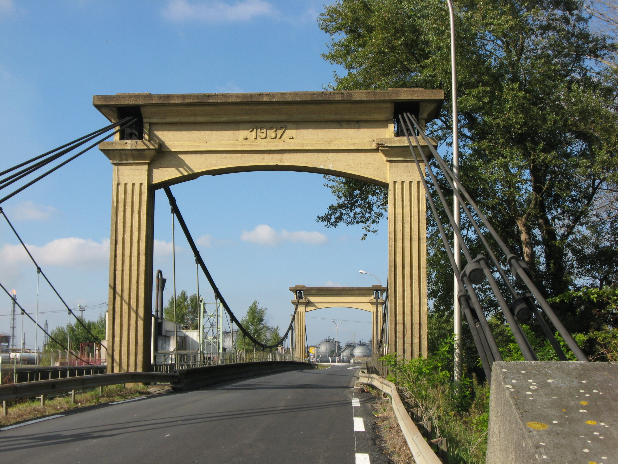 Pont suspendu sur la gave de Pau à Lacq (Pyrénées Atlantiques) Pyrénées).